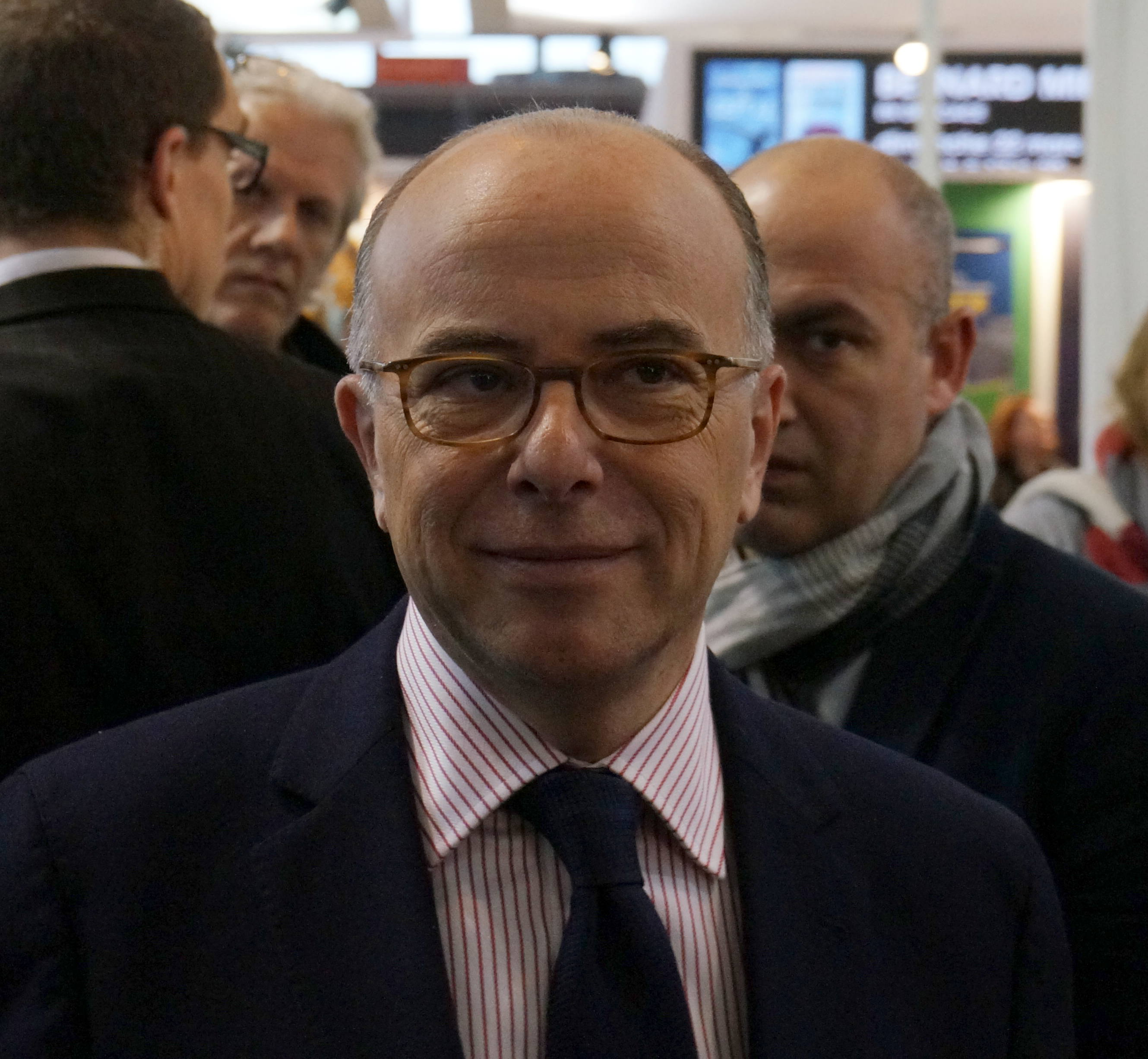 lors du Salon du livre de Paris en 2015.